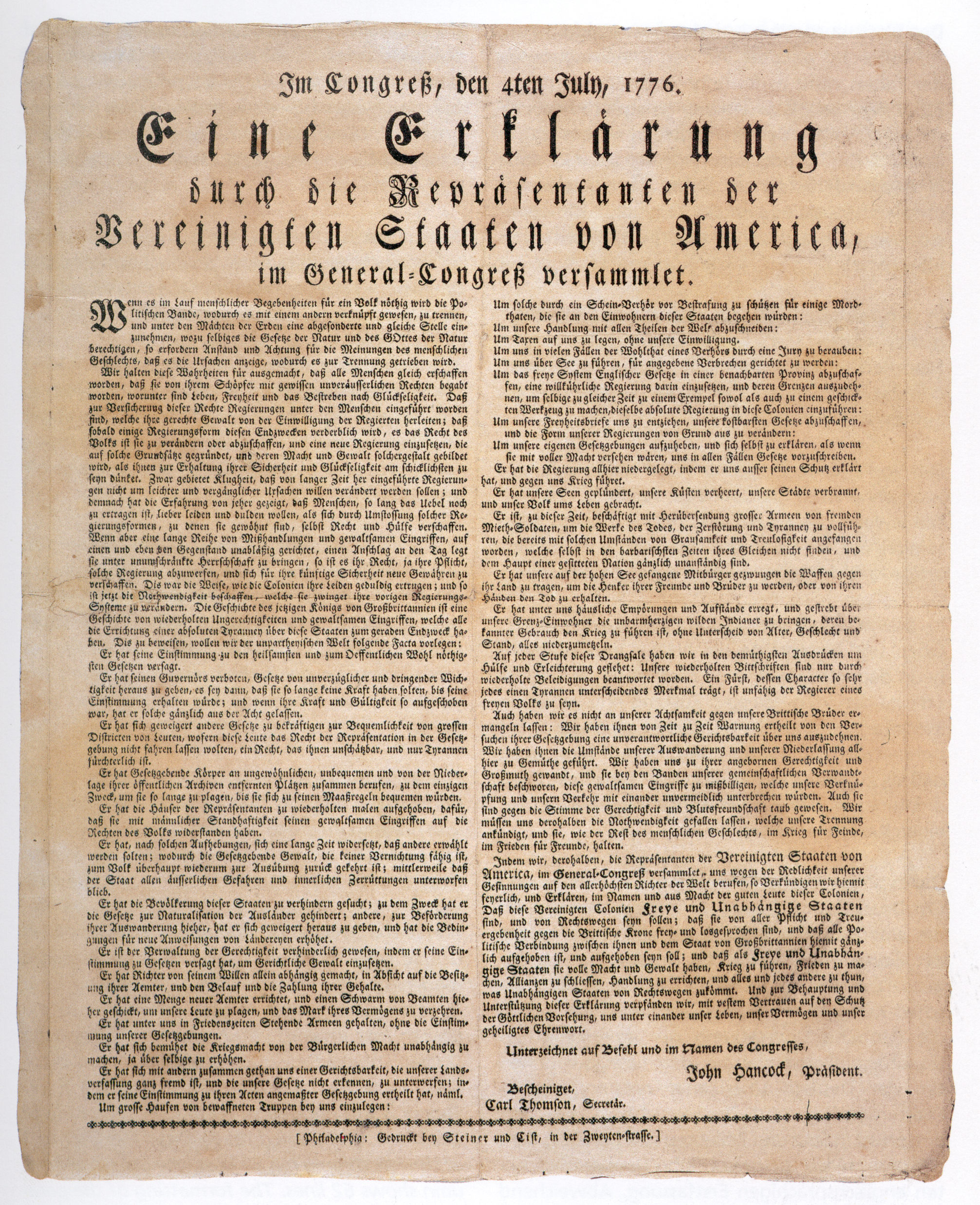 Unabhängigkeitserklärung der USA, deutsche Fassung von 1776